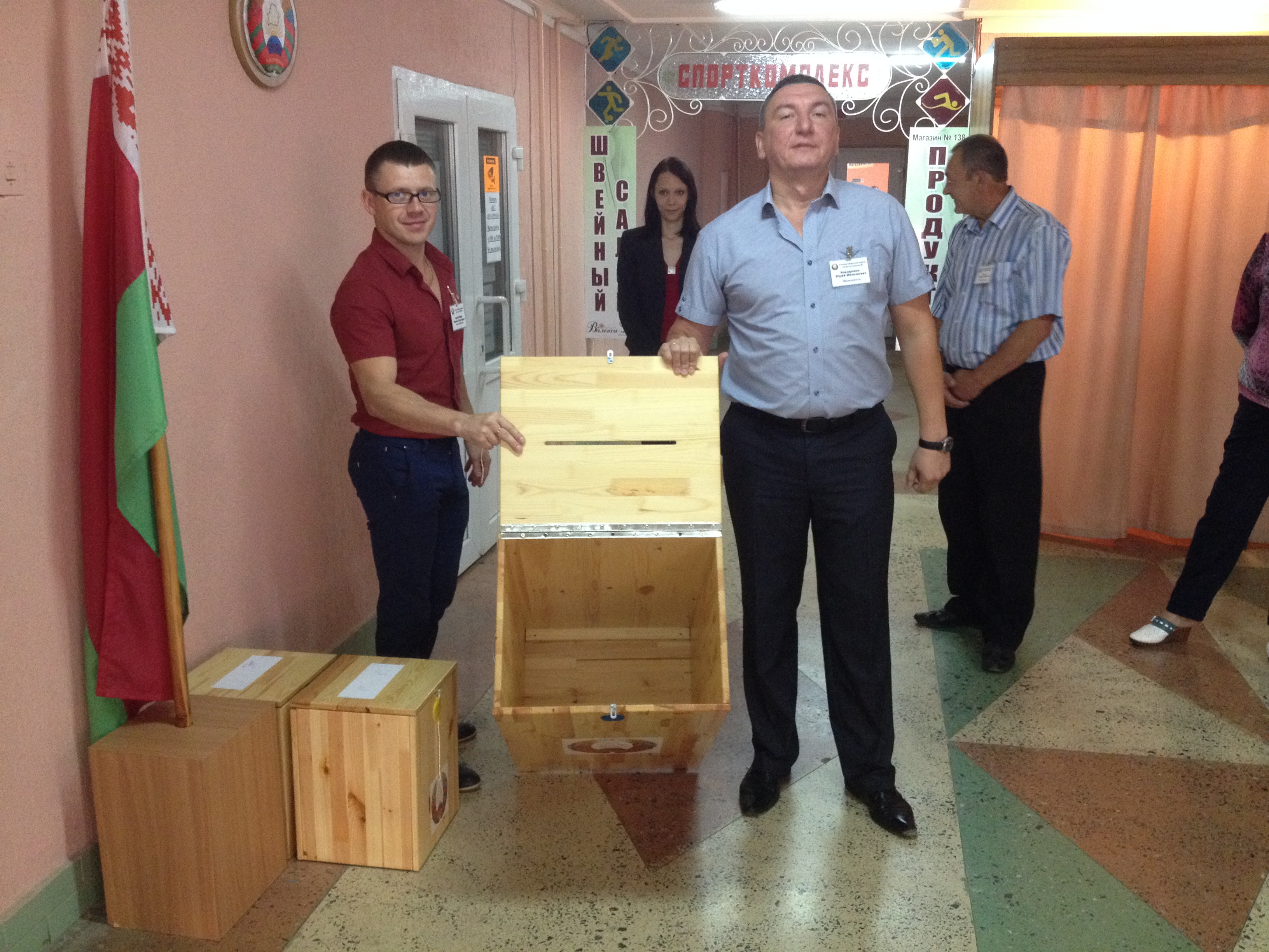 Wybory parlamentarne na Białorusi, 2017